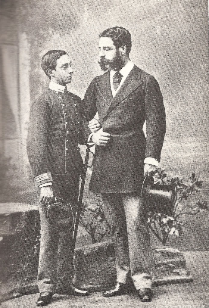 El rey Alfonso XII siendo príncipe, con su mentor José Osorio y Silva, duque de Alburquerque y Sesto, marqués de Alcañices y de Cuéllar.